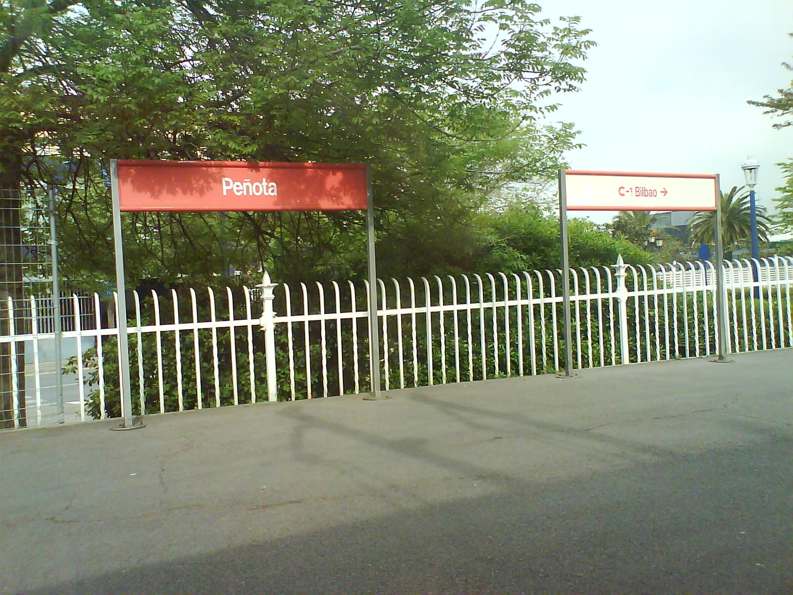 Peñotako renfe aldirikoen geltokia / estación de renfe cercanías Peñota